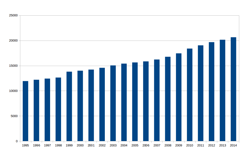 Dane statystyczne dotyczące zmian ludności Gminy Zielonki